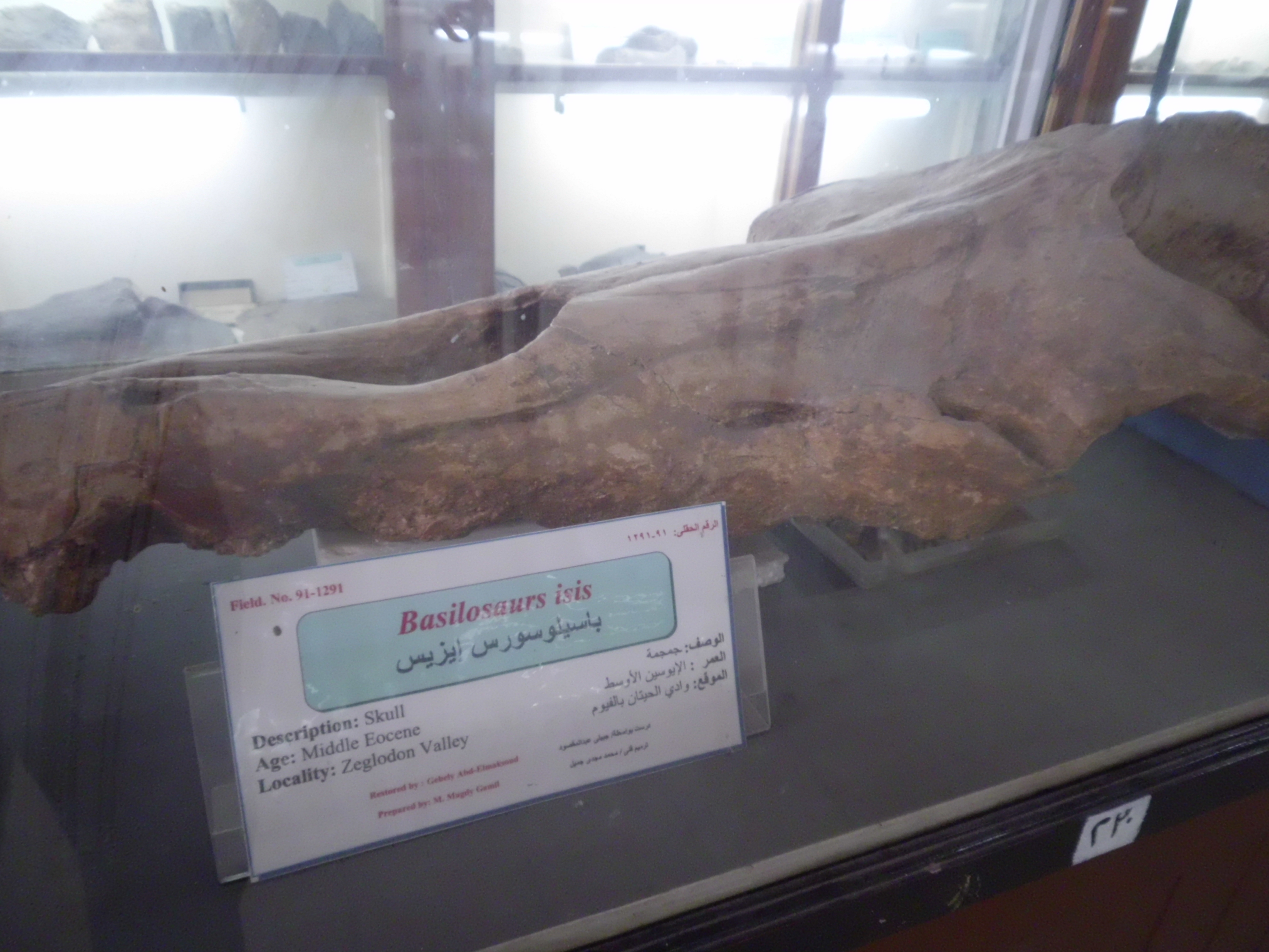 جمجة باسيلوسورس ايزيس من عصر الايوسين الاوسط في وادي الحيتان الفيوم